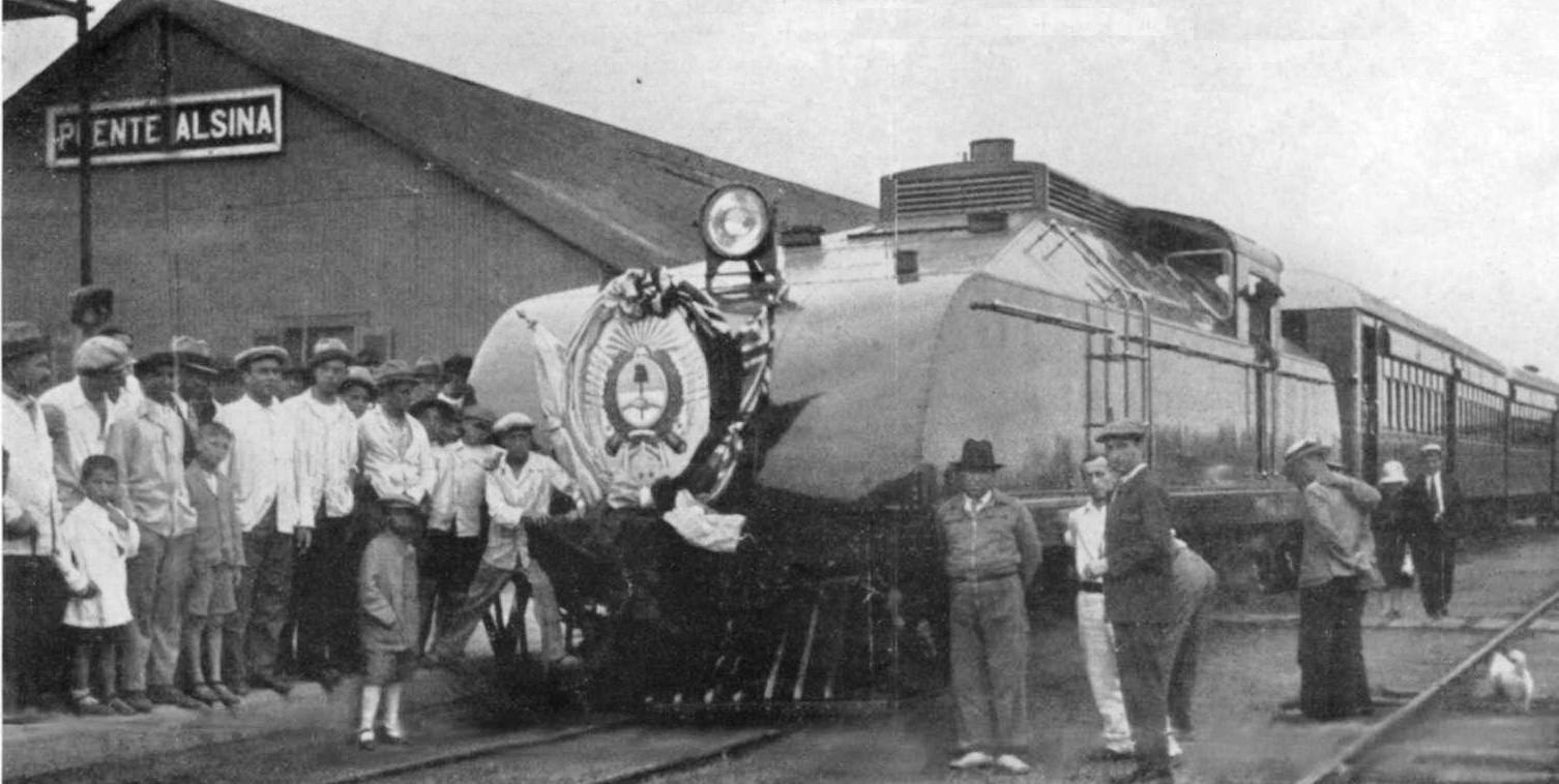 Set de locomotora y coches Sentinel-Cammell, el día de su presentación en la vieja estación Puente Alsina, construída en chapas.